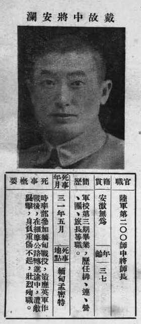 中文（台灣）: 抗戰軍人忠烈錄第一輯中的烈士遺像